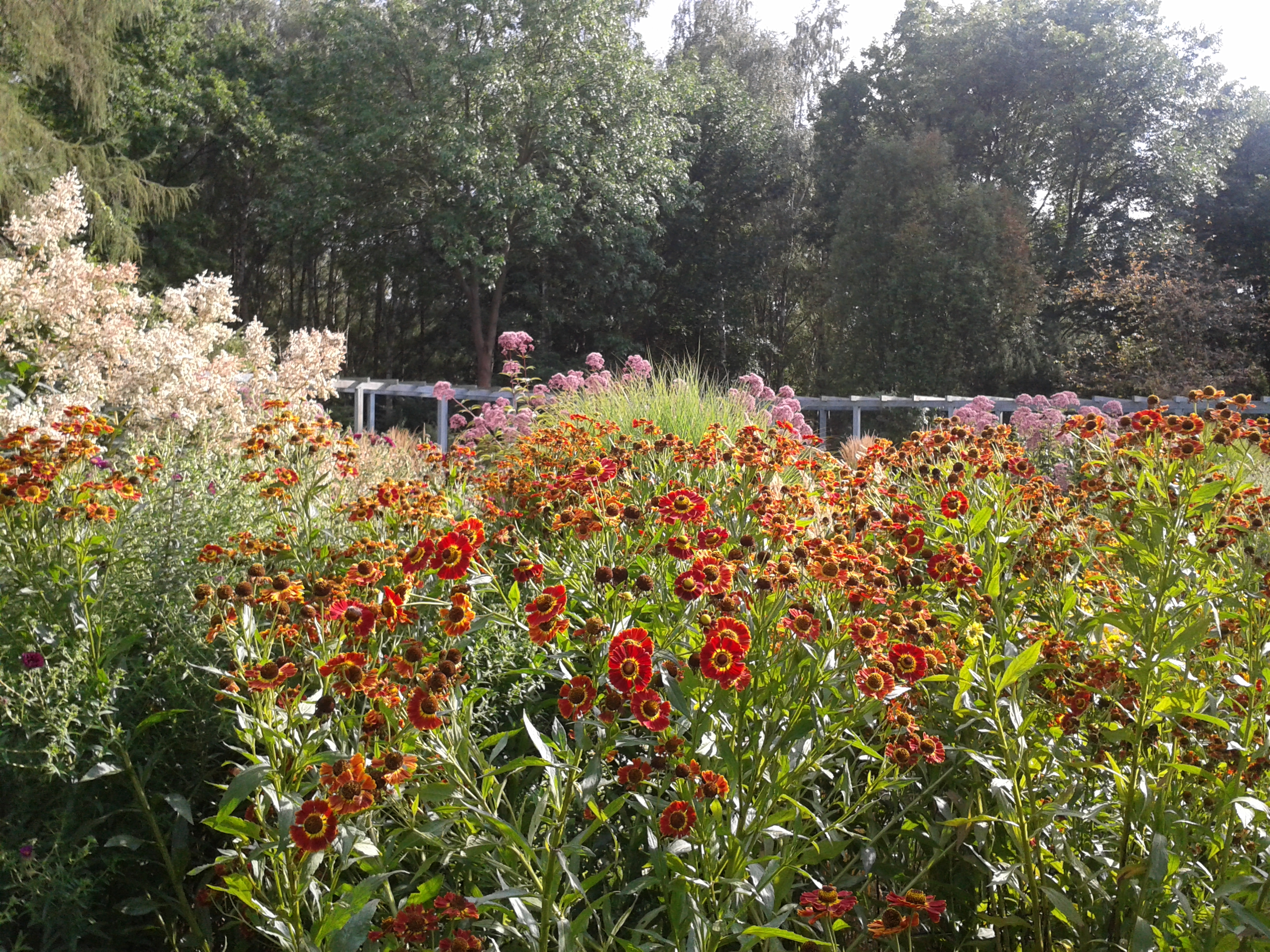 Gärten der Welt in Berlin-Marzahn